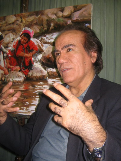 نوه سی نقاش رئالیست ایرانی